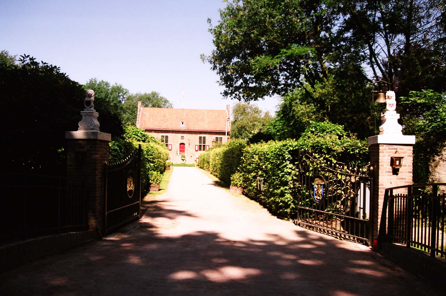 eigen foto Categorie:Afbeelding havezate